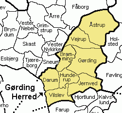 Gørding Herred Ribe Amt, Denmark Map by Svend-Erik Christiansen , edited by Nico-dk.